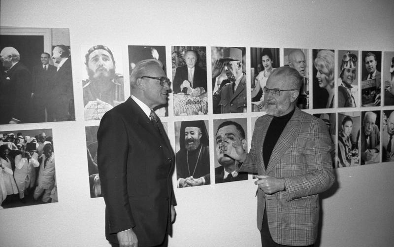 Bayerischer Staatsminister Franz Heubl eröffnet die Ausstellung "Bildautoren aus Bayern" in der Landesvertretung Bayern mit dem Fotografen Hanns Hubmann.